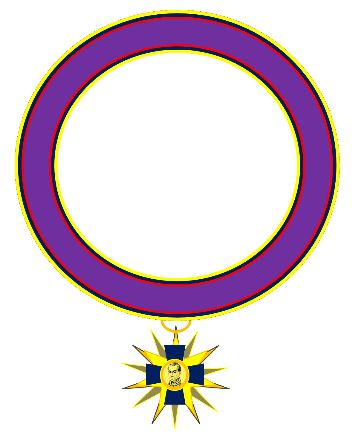 Collar de la Orden de Boyacá